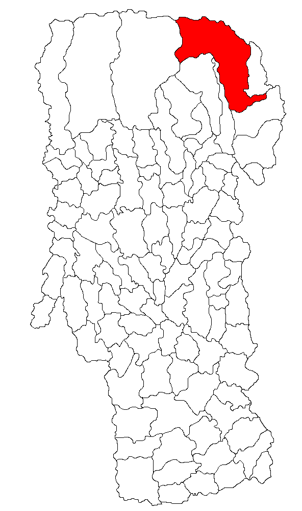 Categorie:Hărţi ale judeţului Argeş